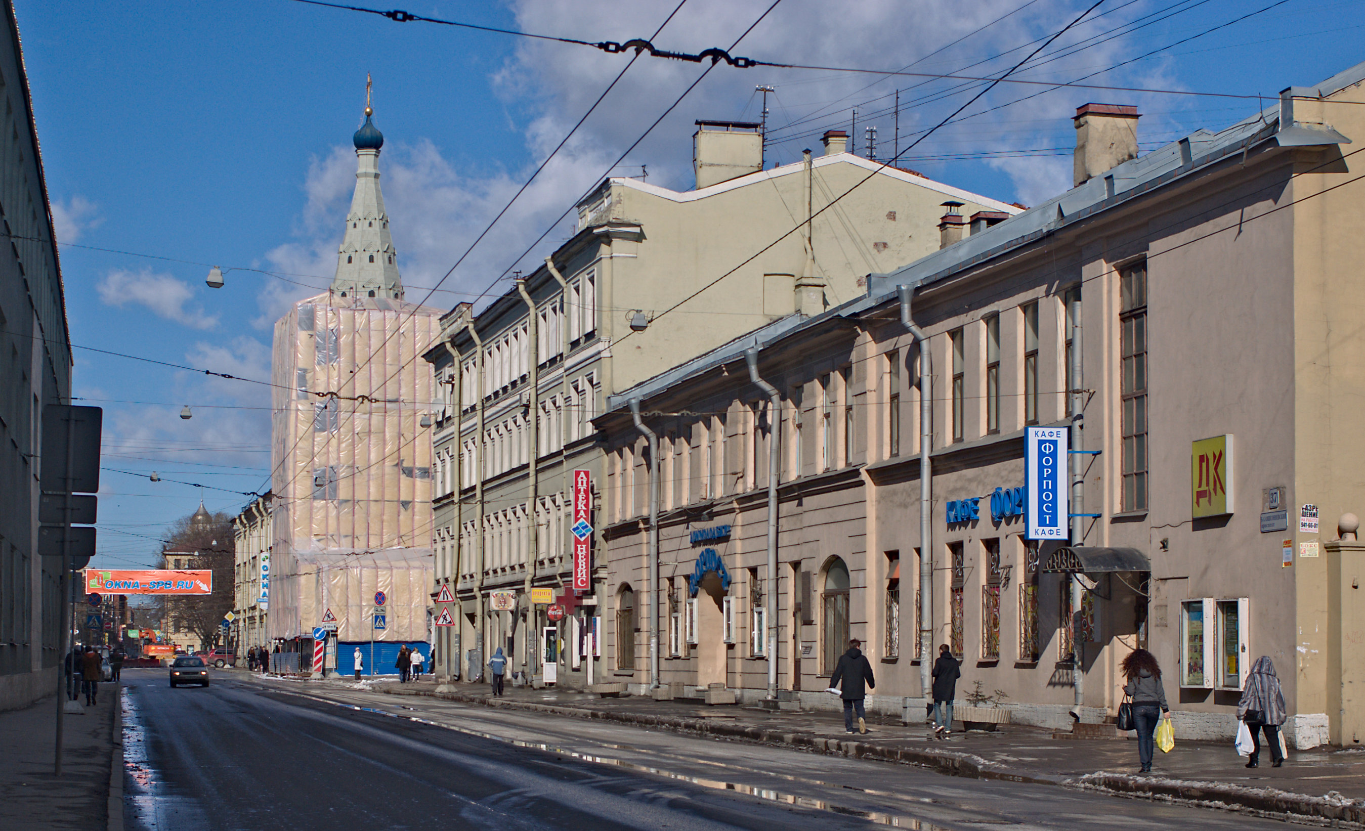 Большой Сампсониевский проспект (с Нейшлотского переулка в сторону Гренадёрской улицы), Санкт-Петербург